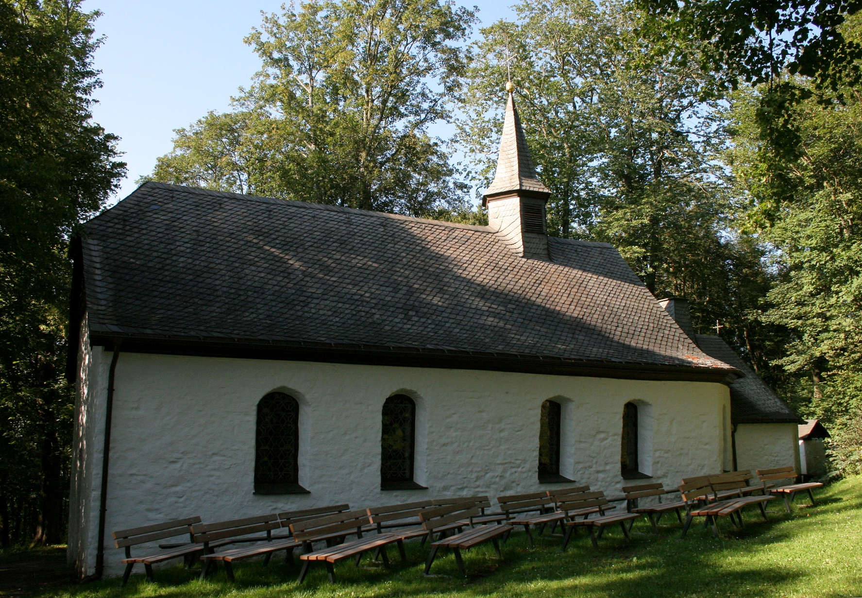 Kapelle auf dem Wilzenberg bei Schmallenberg